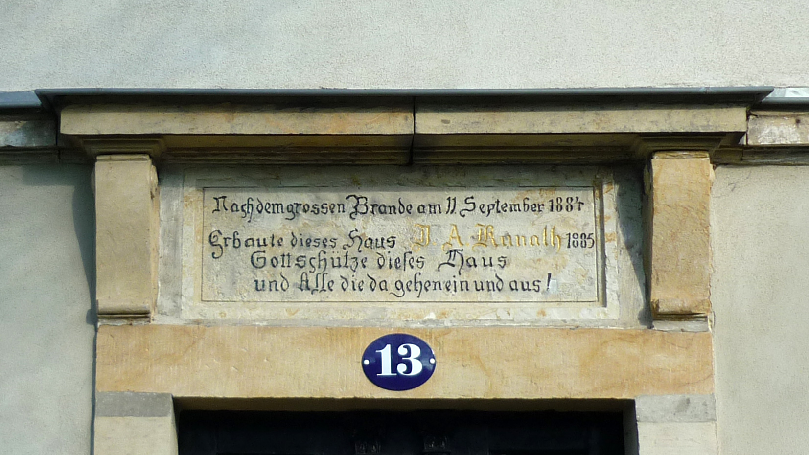 Tafel am Haus Uttewalde Nr. 13 mit folgender Inschrift: Nach dem grossen Brande am 11. September 1884 Erbaute dieses Haus D. A. Kunath 1885. Gott schütze dieses Haus und Alle die da gehen ein und aus.